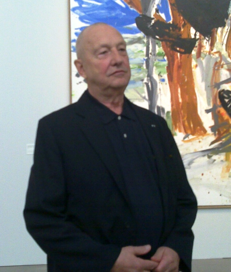 Valokuva Georg Baselitzista Helsingin taidemuseossa 15.4.2010